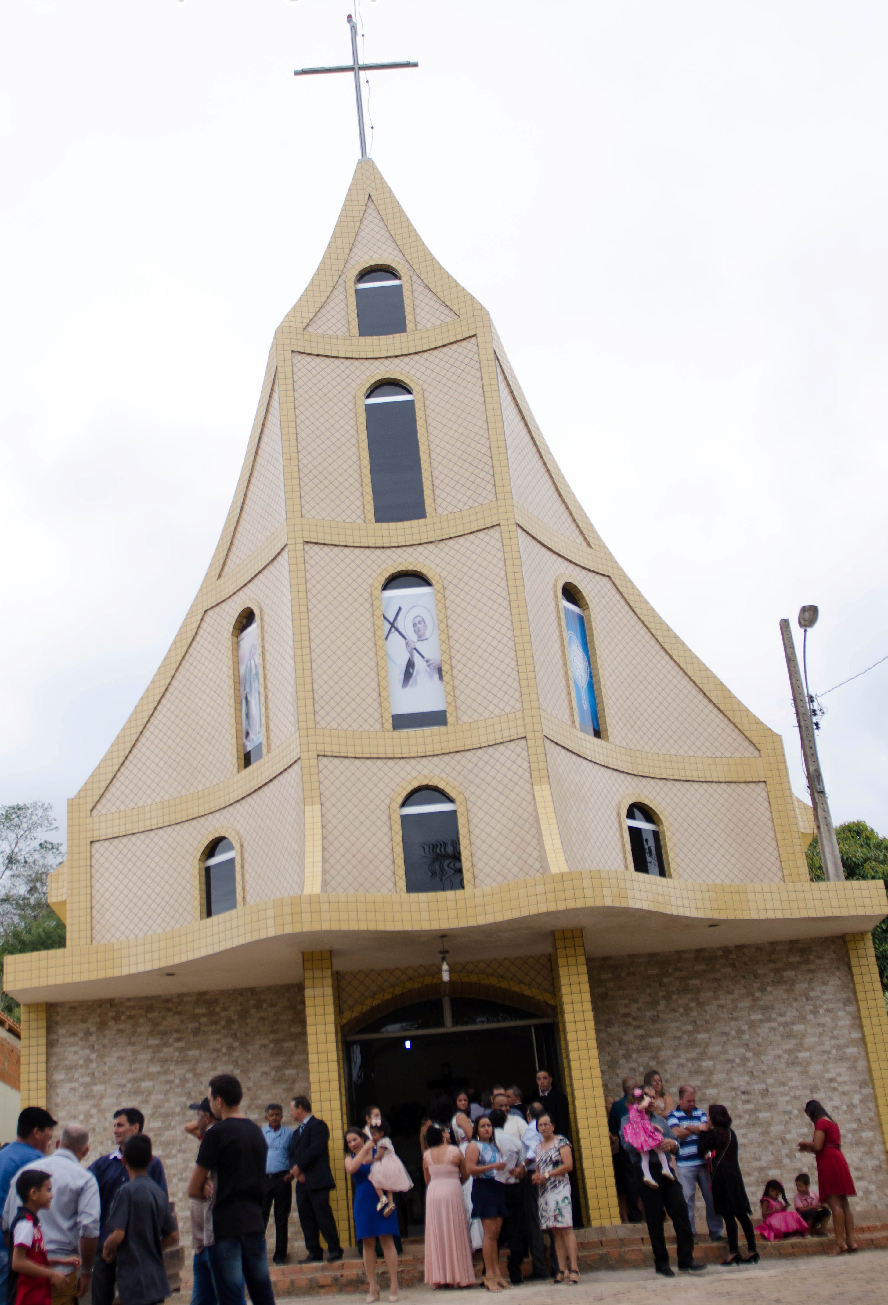 Faixada.